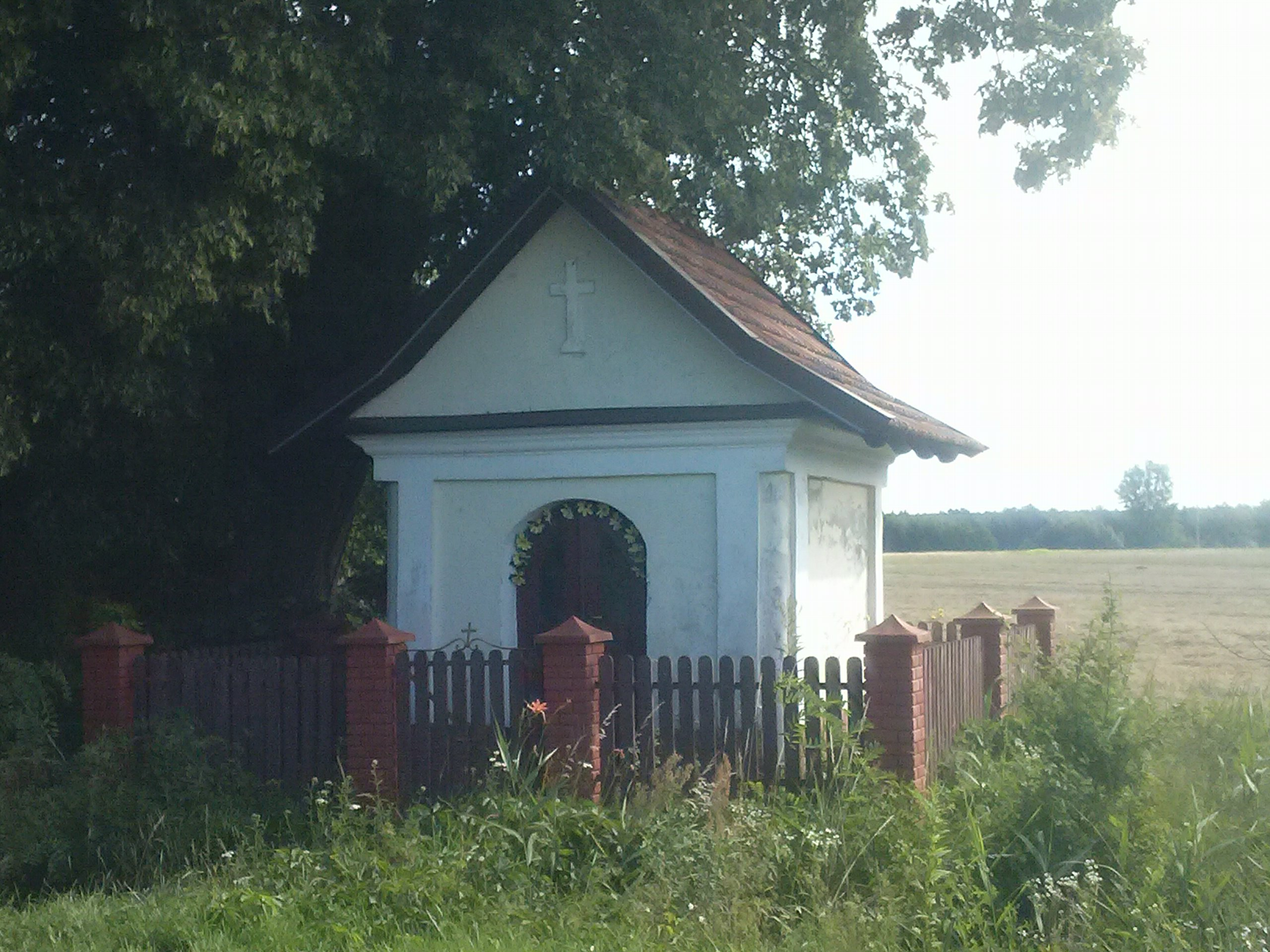 Kapliczka w Leżachowie obok Góry Kamień (przy drodze do Sieniawy)